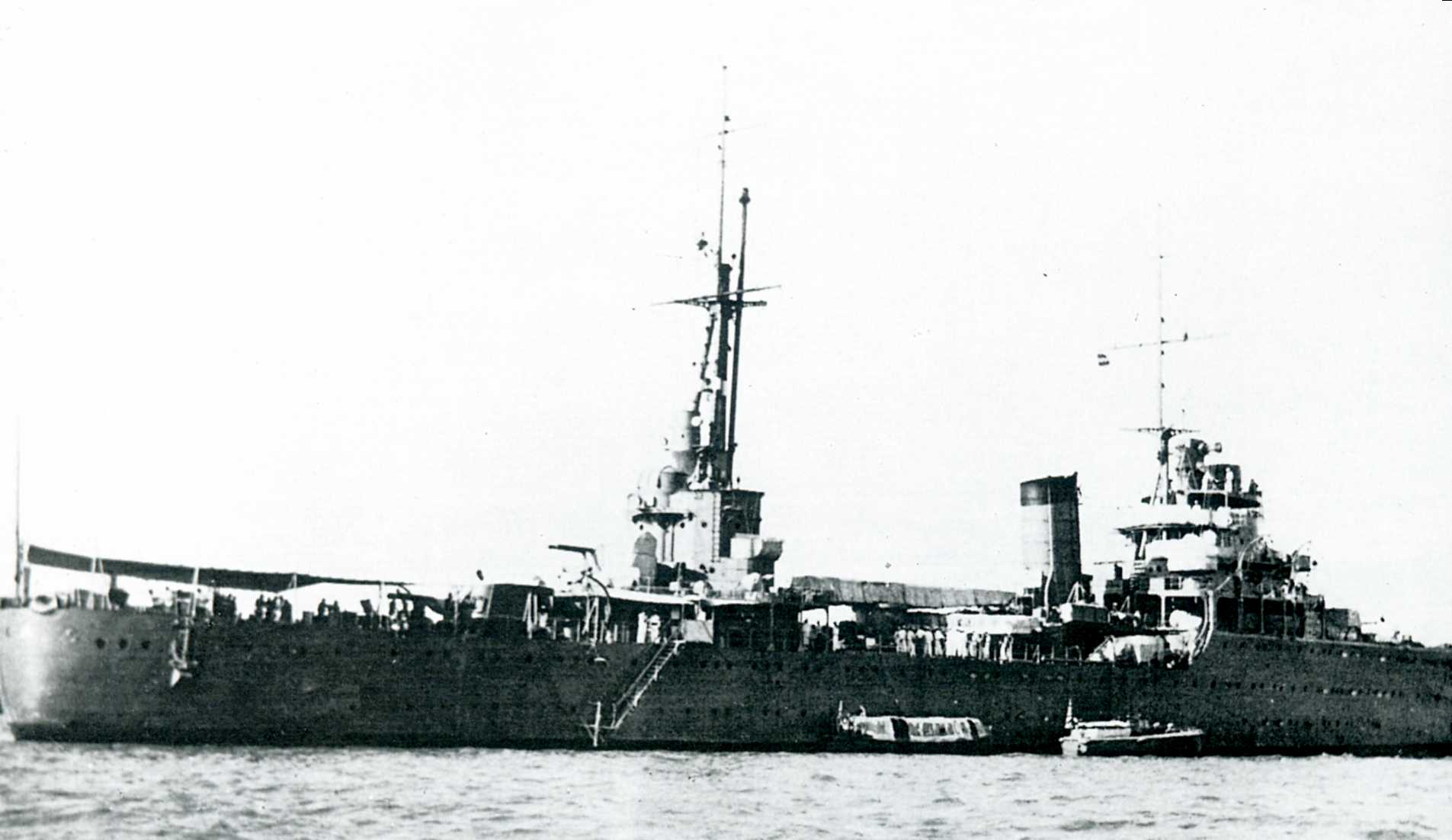 Japanese cruiser Kashima at Shanghai in 1940